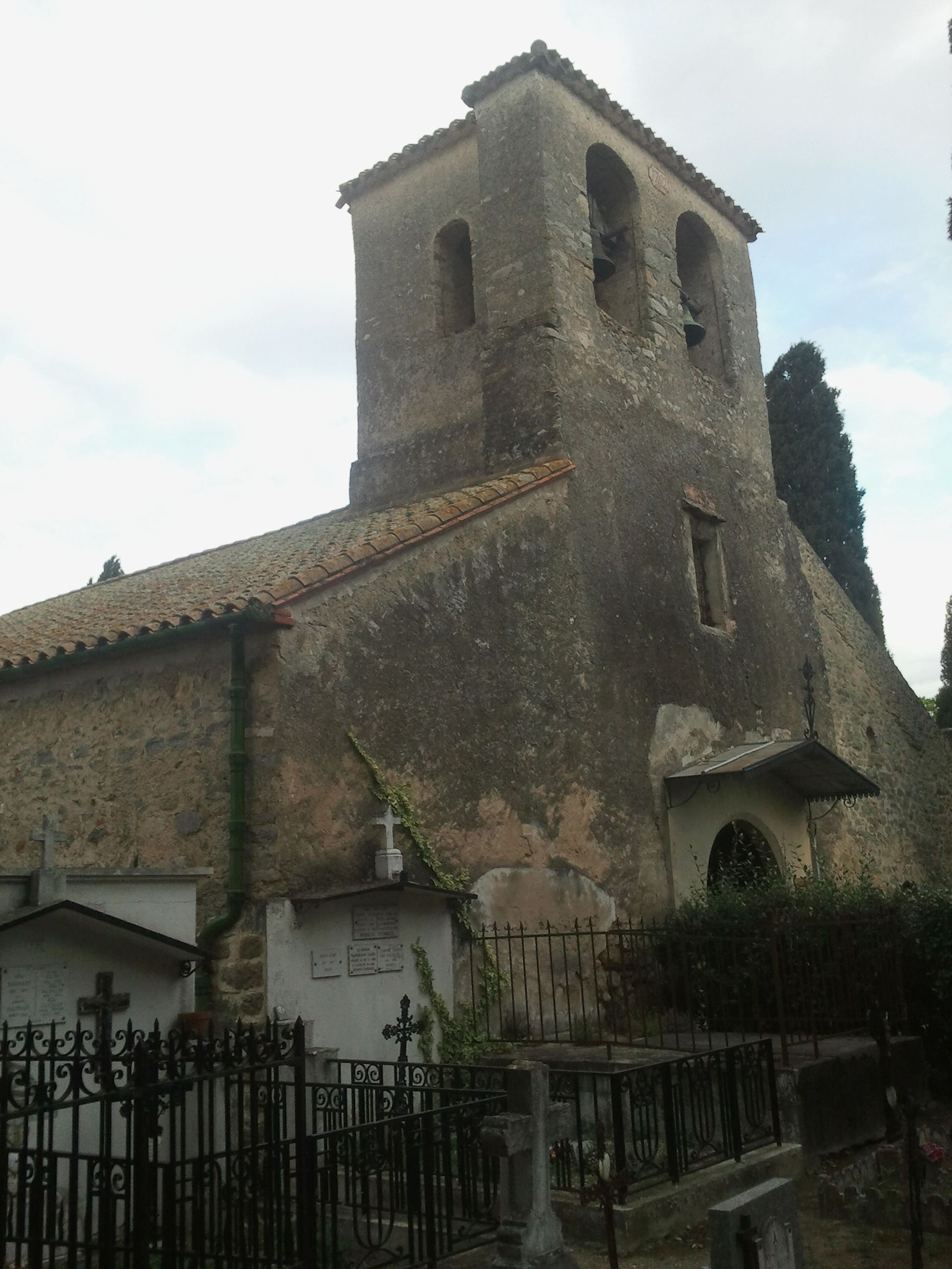 Vue du nord-ouest de l'église Saint-Jean de Saint-Jean-Pla-de-Corts